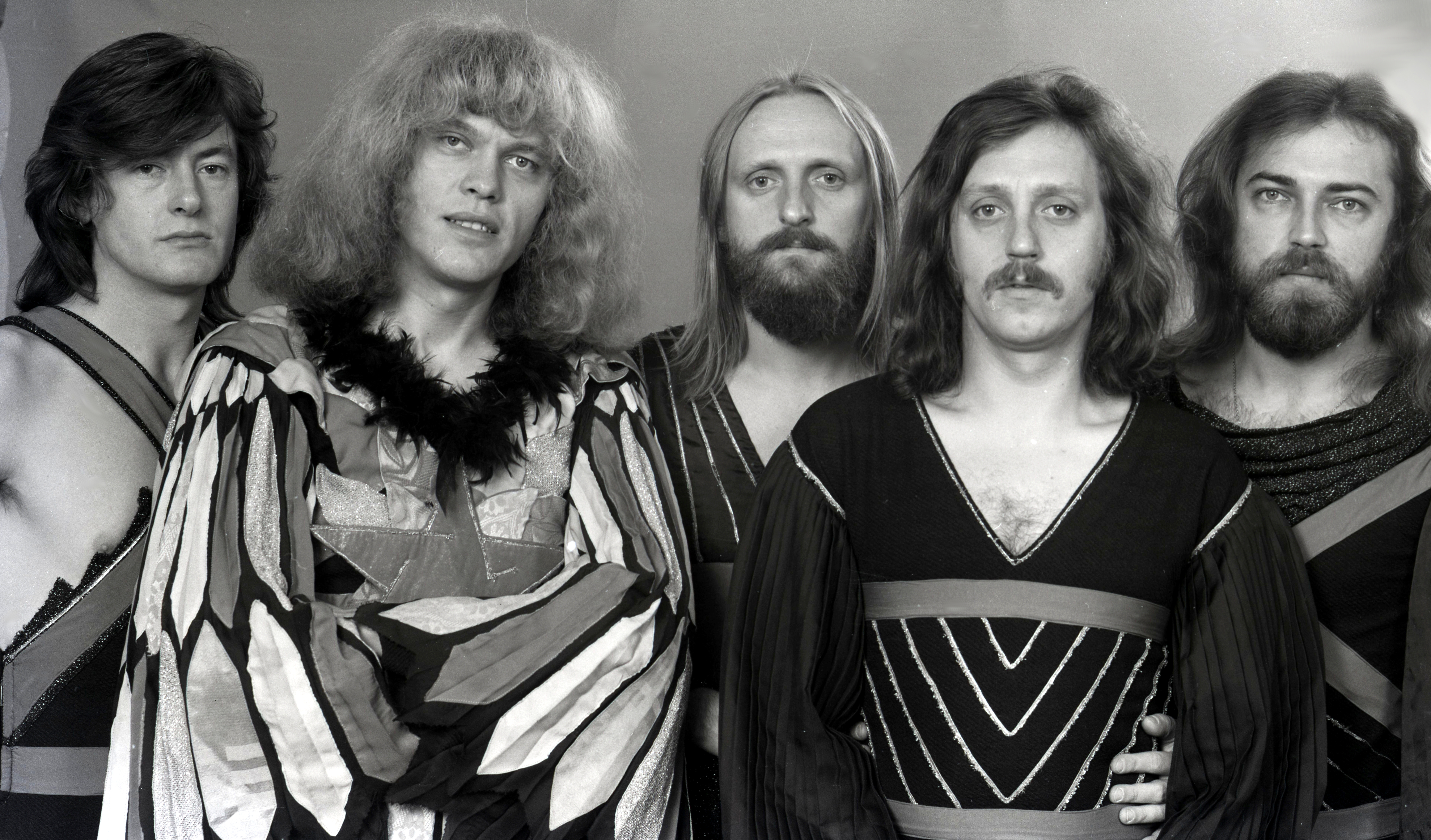 Az Omega együttes, Kossuth-díjas és Liszt Ferenc-díjas magyar rockegyüttes, mely 1962-ben alakult, 2012-ben ünnepelte fennállása 50. évfordulóját.